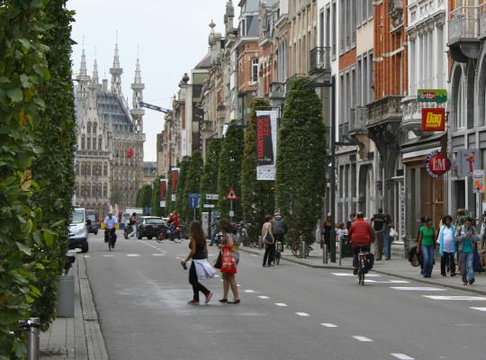 Bondgenotenlaan